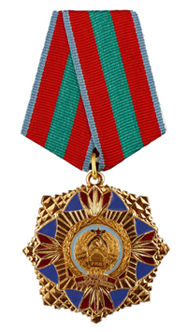 PMR state order